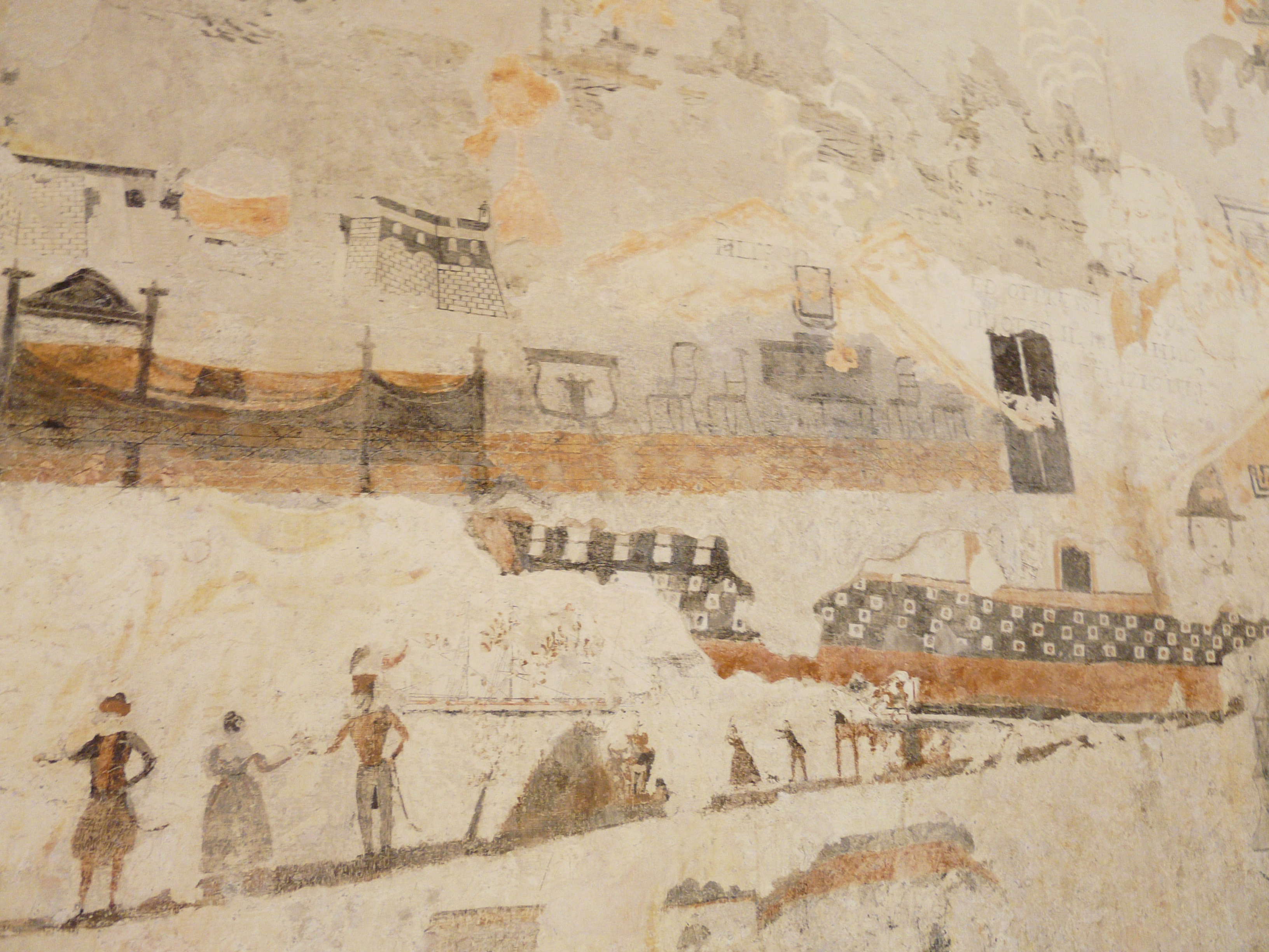 Interno delle carceri di Palazzo Ducale, Genova, Liguria, Italia